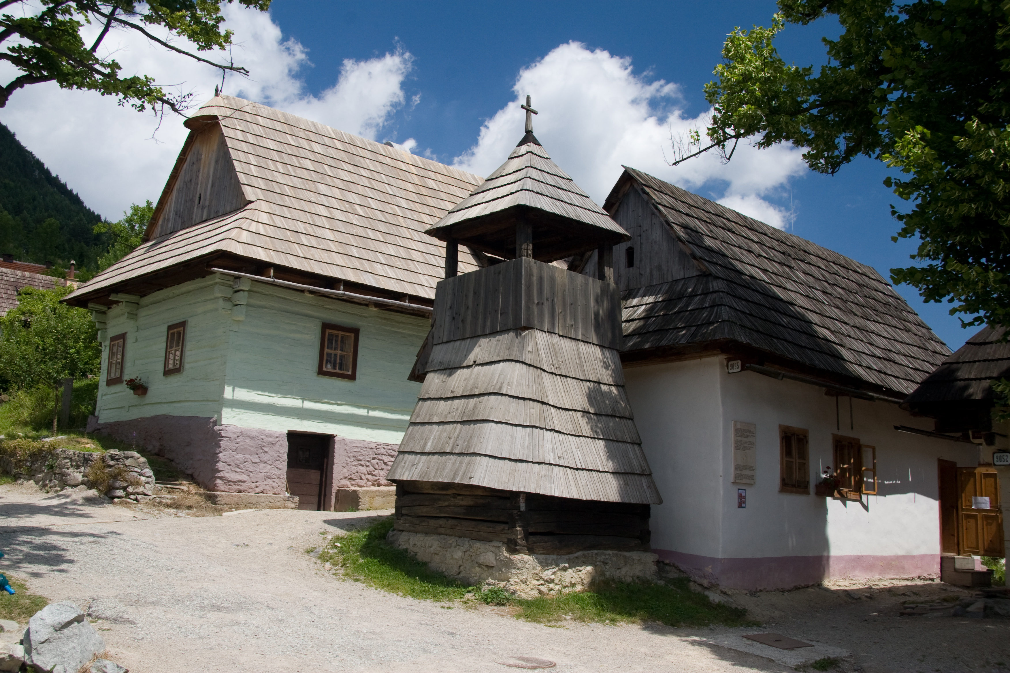 Vlkolínec